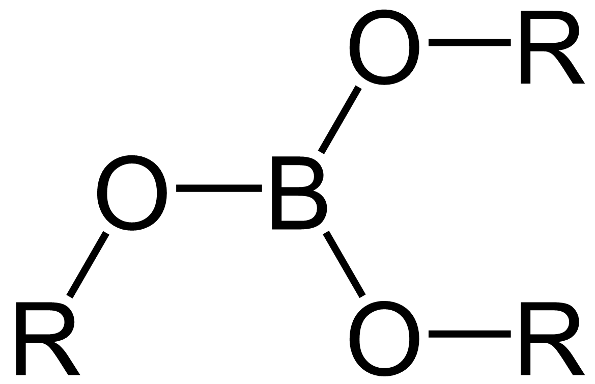 Allgemeine Struktur von Borsäureestern